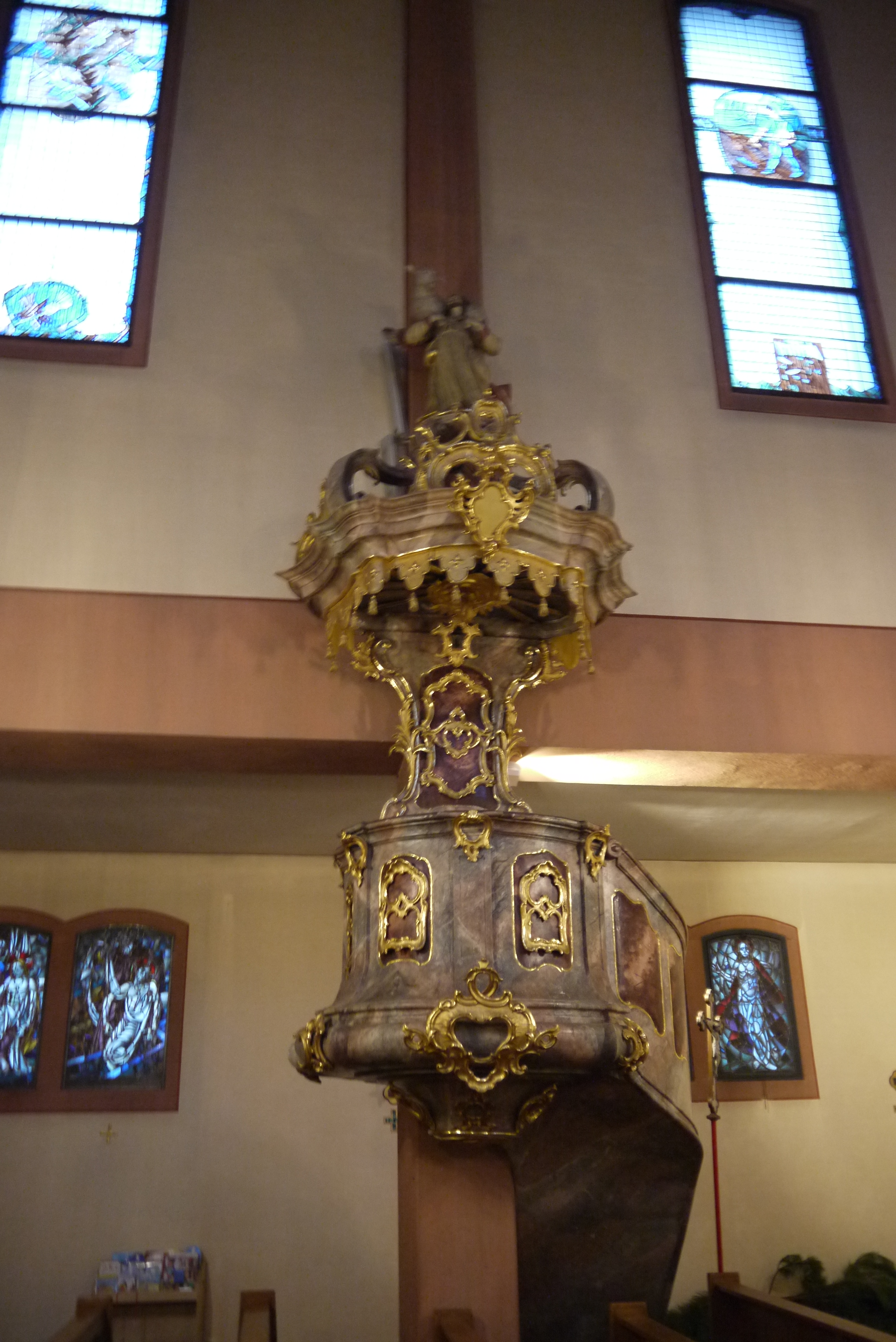 Kirche St. Martin Külsheim